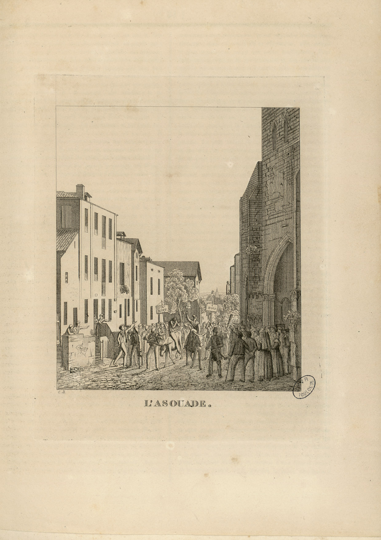 Fait partie d'un recueil des 36 premiers numéros du Pélerin, chaque numéro étant accompagné d'une gravure Ancely, René (1876 - 1966). Possesseur